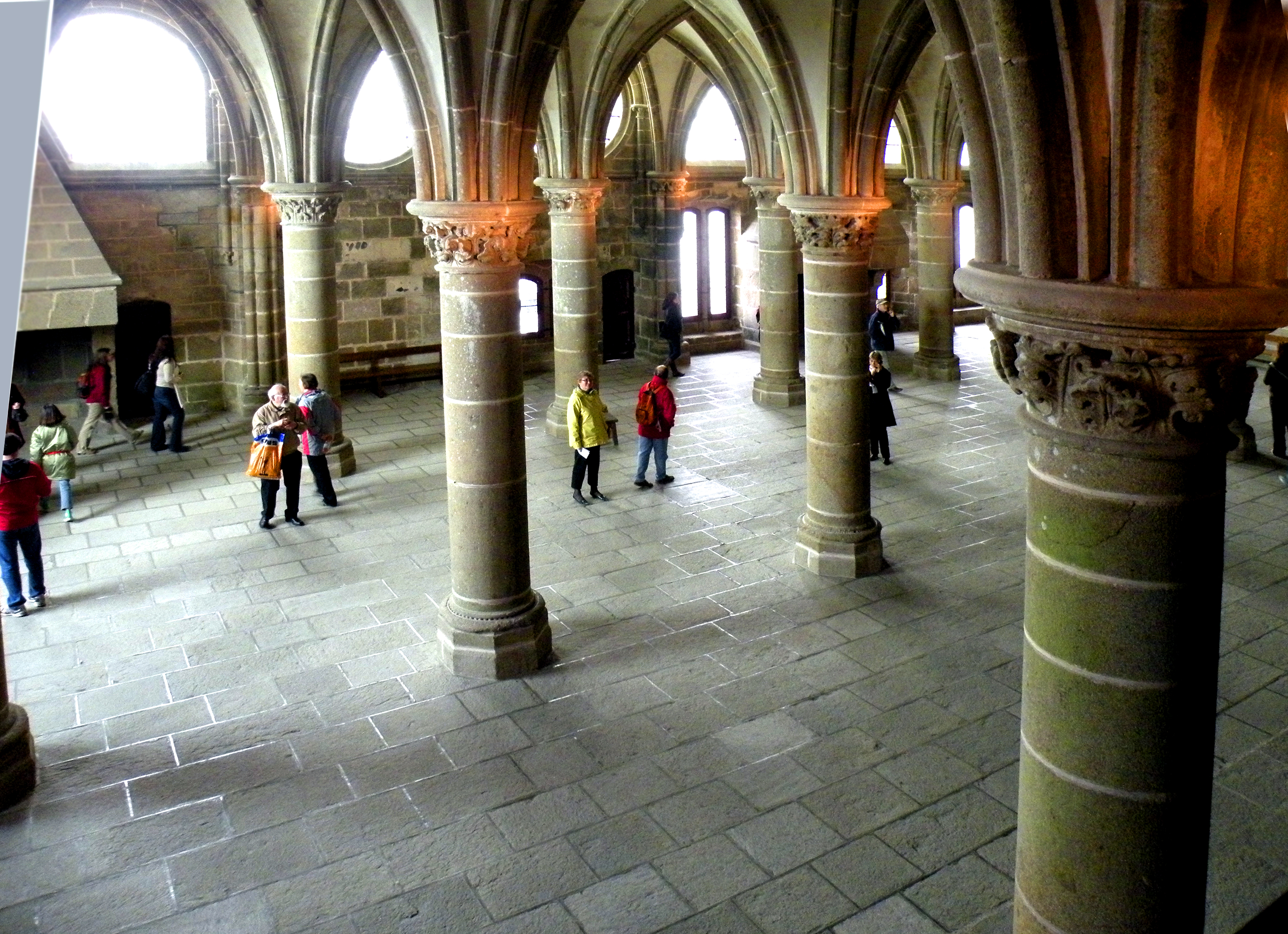 Мон-сен-Мишель.Рыцарский зал.